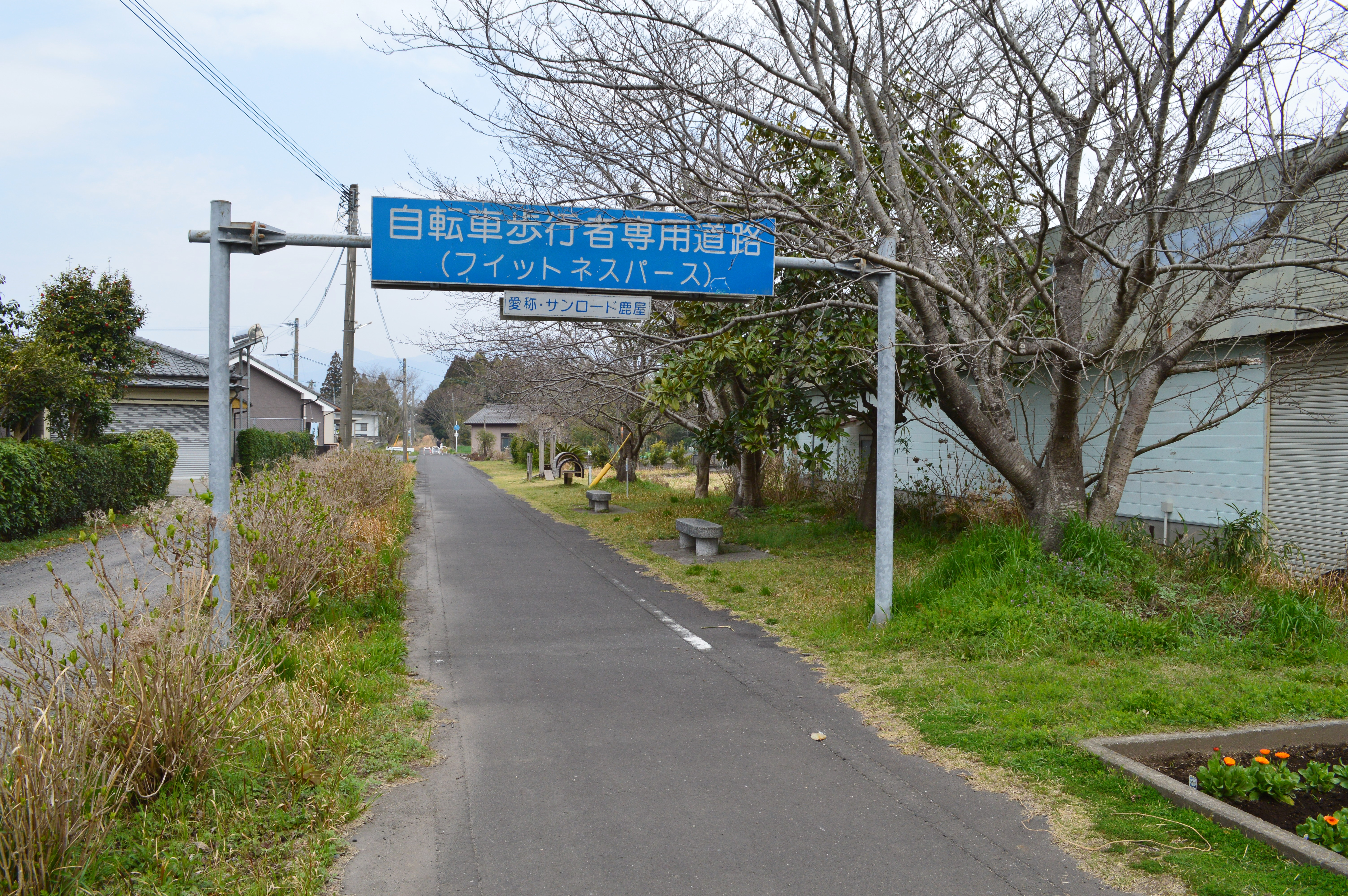 大隅川西駅跡